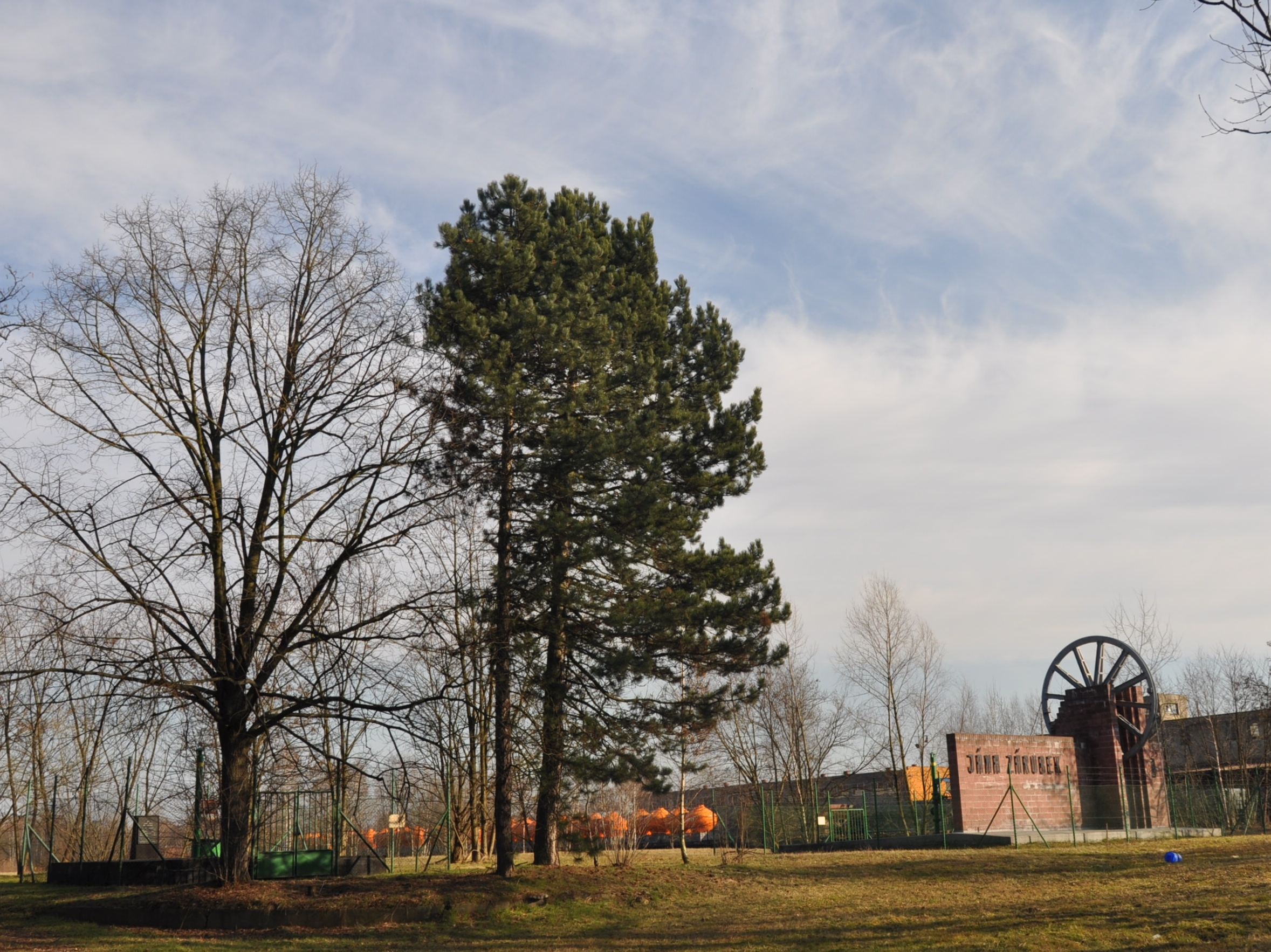 Pohled na areál bývalého dolu Hermenegild/Zárubek s označením bývalých jam.